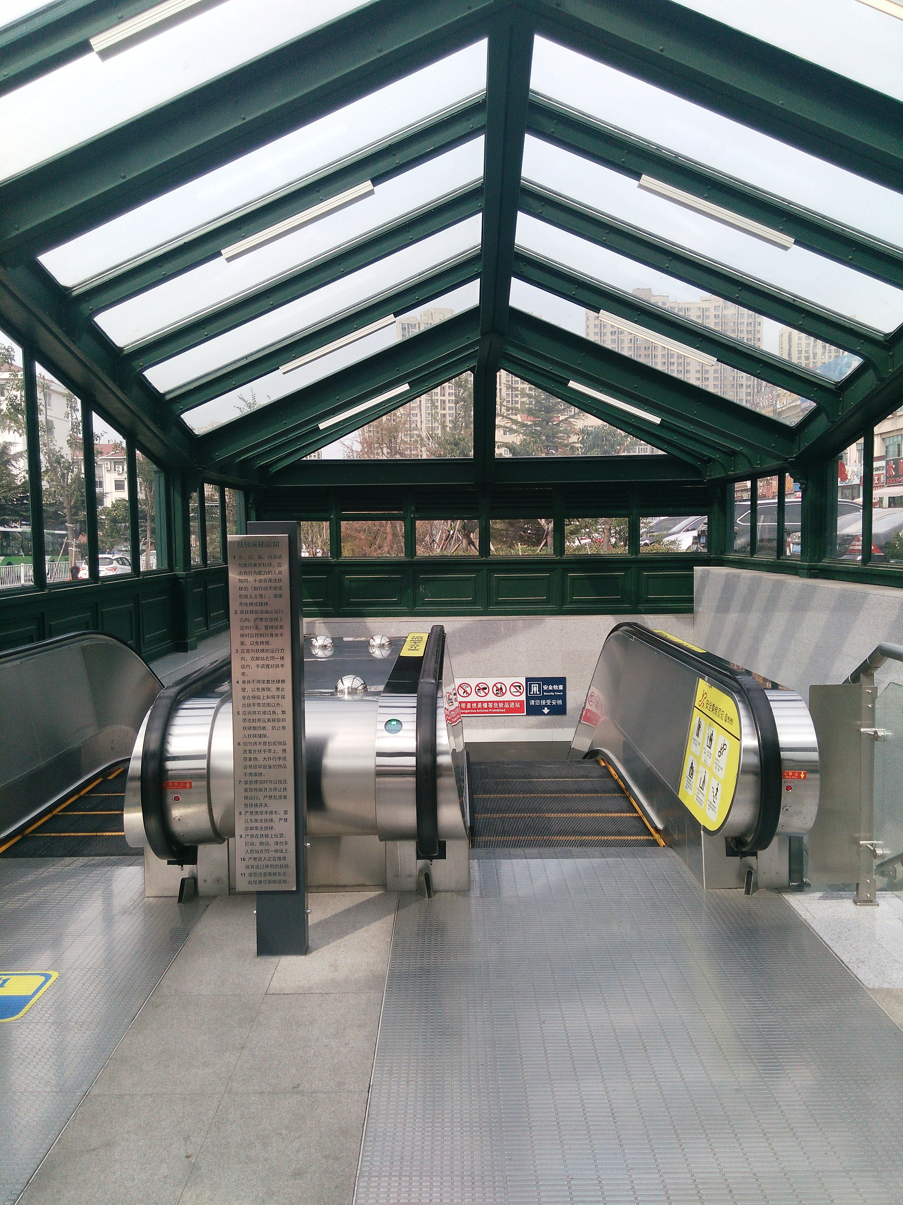 青岛地铁万年泉路站B口扶梯